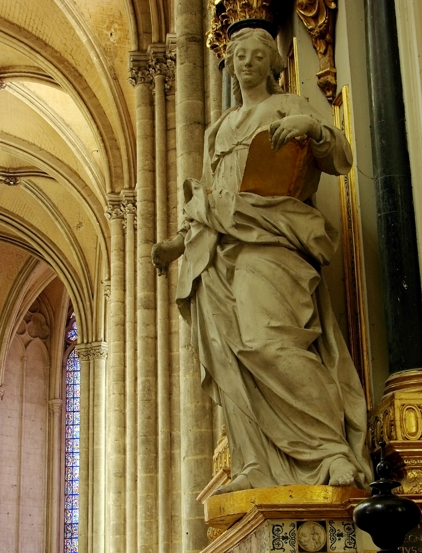 Chapelle de Notre-Dame du Pilier Rouge ou de Notre-Dame de Puy; oeuvre de Nicolas Blasset, offerte en 1627 par Antoine Pingre, maître de la Confrérie du Puy, détail: Sainte Geneviève par Cressent. Cathédrale Notre-Dame d'Amiens.